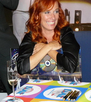 Patty Zomer met haar gouden CD voor "Reünie concert 2007"